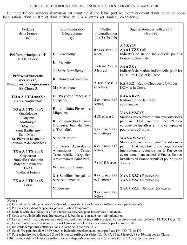 Grille de codification des indicatifs radioamateurs en France.Un indicatif des services d’amateur est constitué d’une lettre préfixe, éventuellement d’une lettre de souslocalisation, d’un chiffre et d’un suffixe de 2 à 4 lettres (cf. tableau ci-dessous).